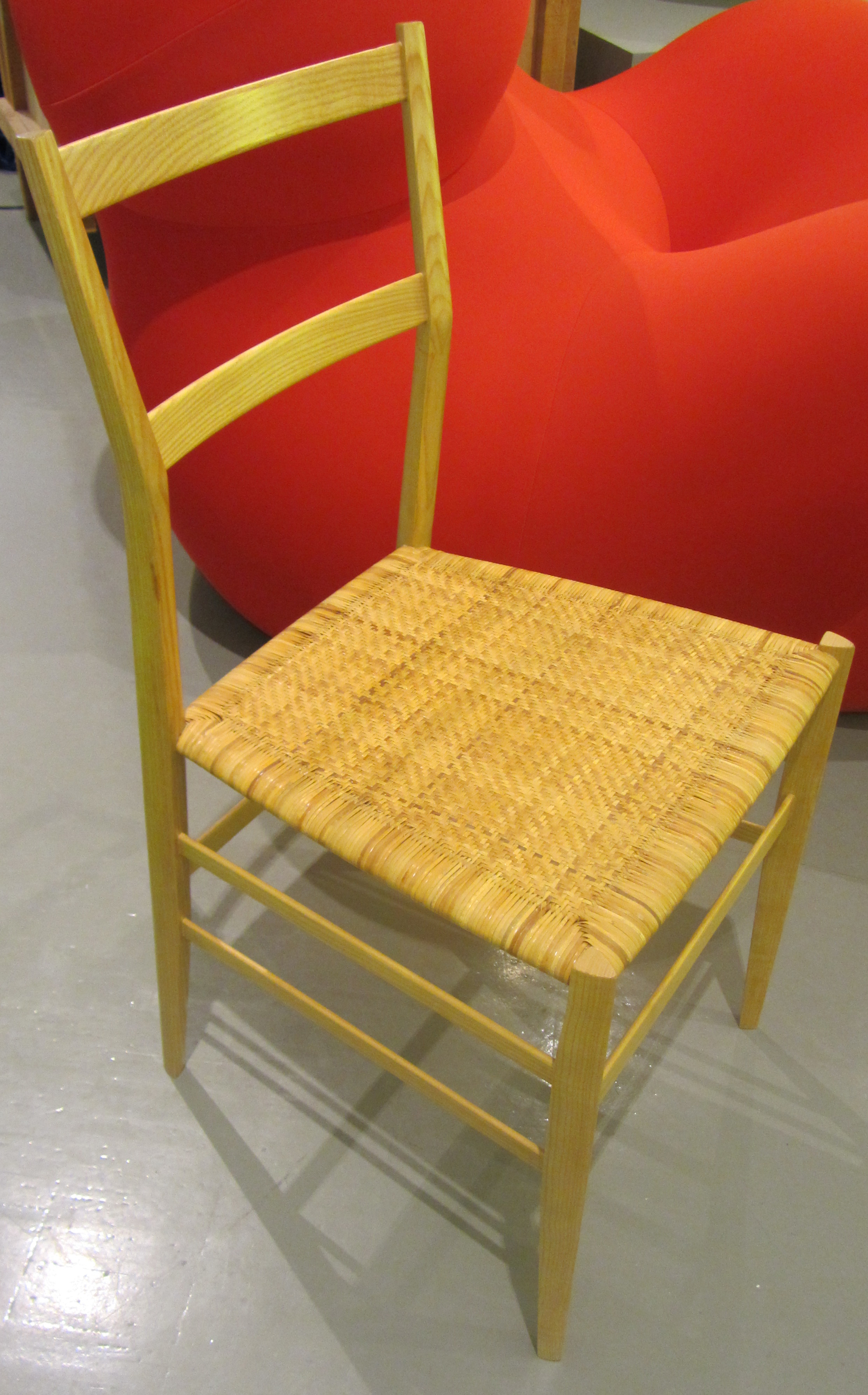 La sedia "Superleggera" di Giò Ponti, prodotta dall'azienda italiana d'arredamento CASSINA a partire dal 1957. La sedia pesa solo 1,7kg ed è fatta con materiali naturali: legno di frassino e canna d'india. Oltre che leggera è resistente: un bizzarro collaudo la vede rimbalzare invece che sfracellarsi dopo essere stata lasciata cadere dal 4 piano di un'edificio. Dietro s'intravede la UP 5 della Serie "UP" sempre di Gaetano Pesce. Le foto sono state scattate durante un evento gratuito con totale libertà di provare e fotografare gli oggetti esposti presso il Triennale Design Museum di Milano, a Cadorna.